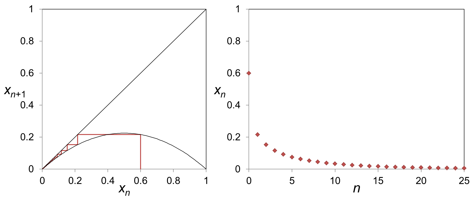 パラメータa=0.9のクモの巣図と時系列